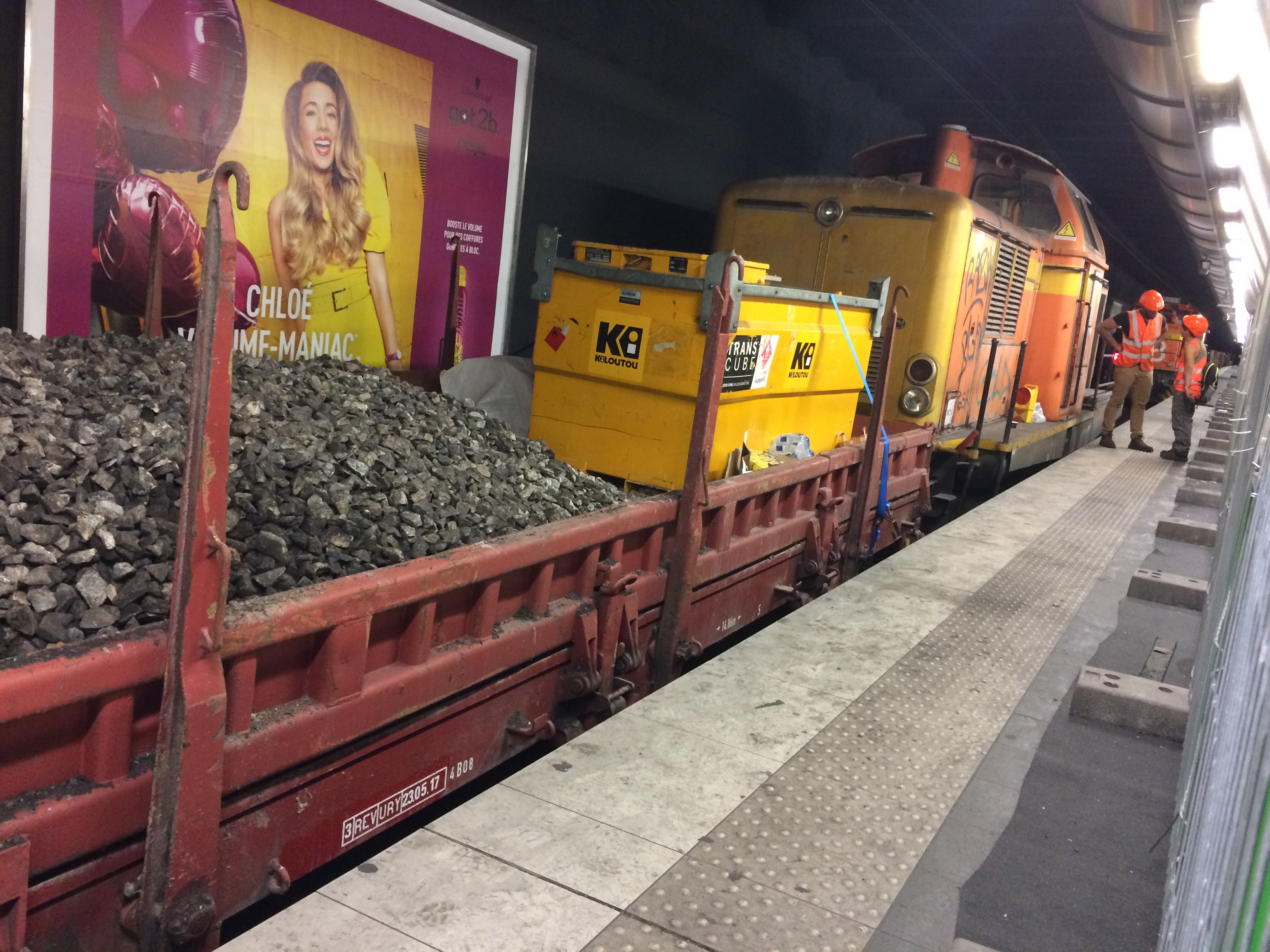 Train de chantier du renouvellement du ballast des voies du RER A en gare de Châtelet - Les Halles, à Paris 1er, France.